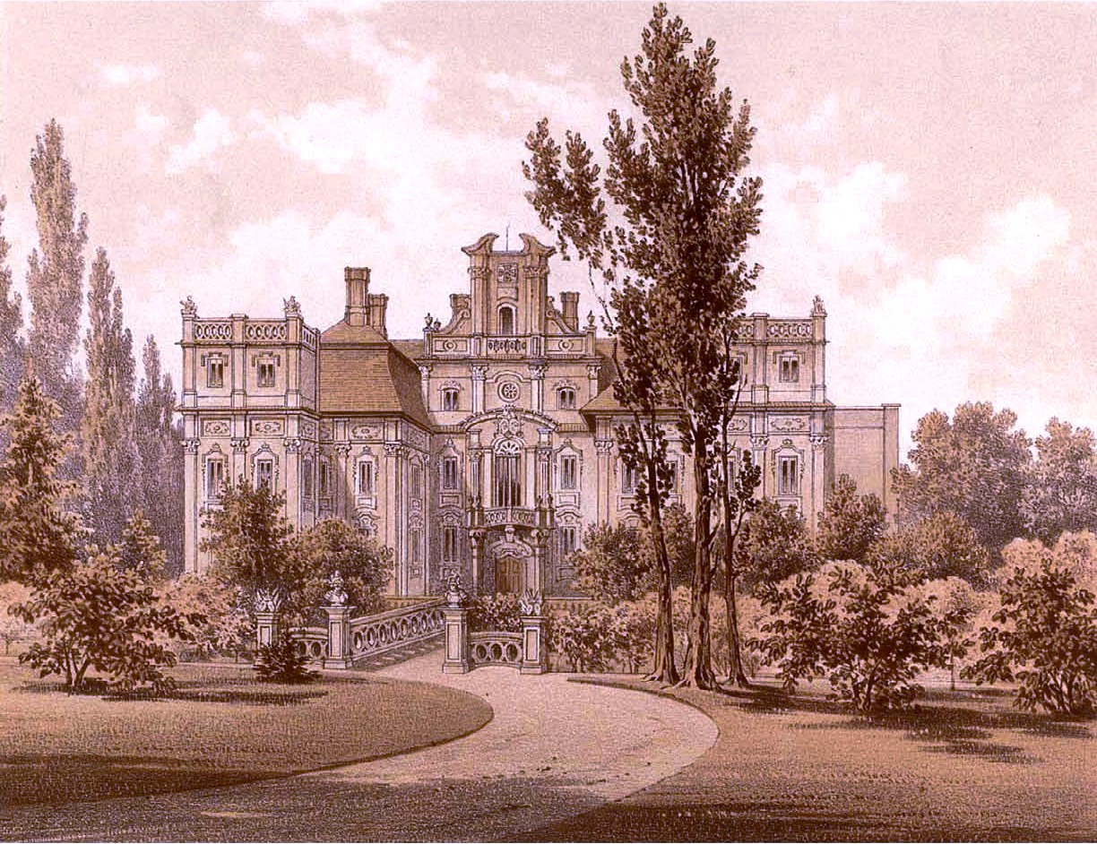 Schloss Brauchitschdorf, Kreis Lüben, Lithografie aus dem 19. Jahrhundert